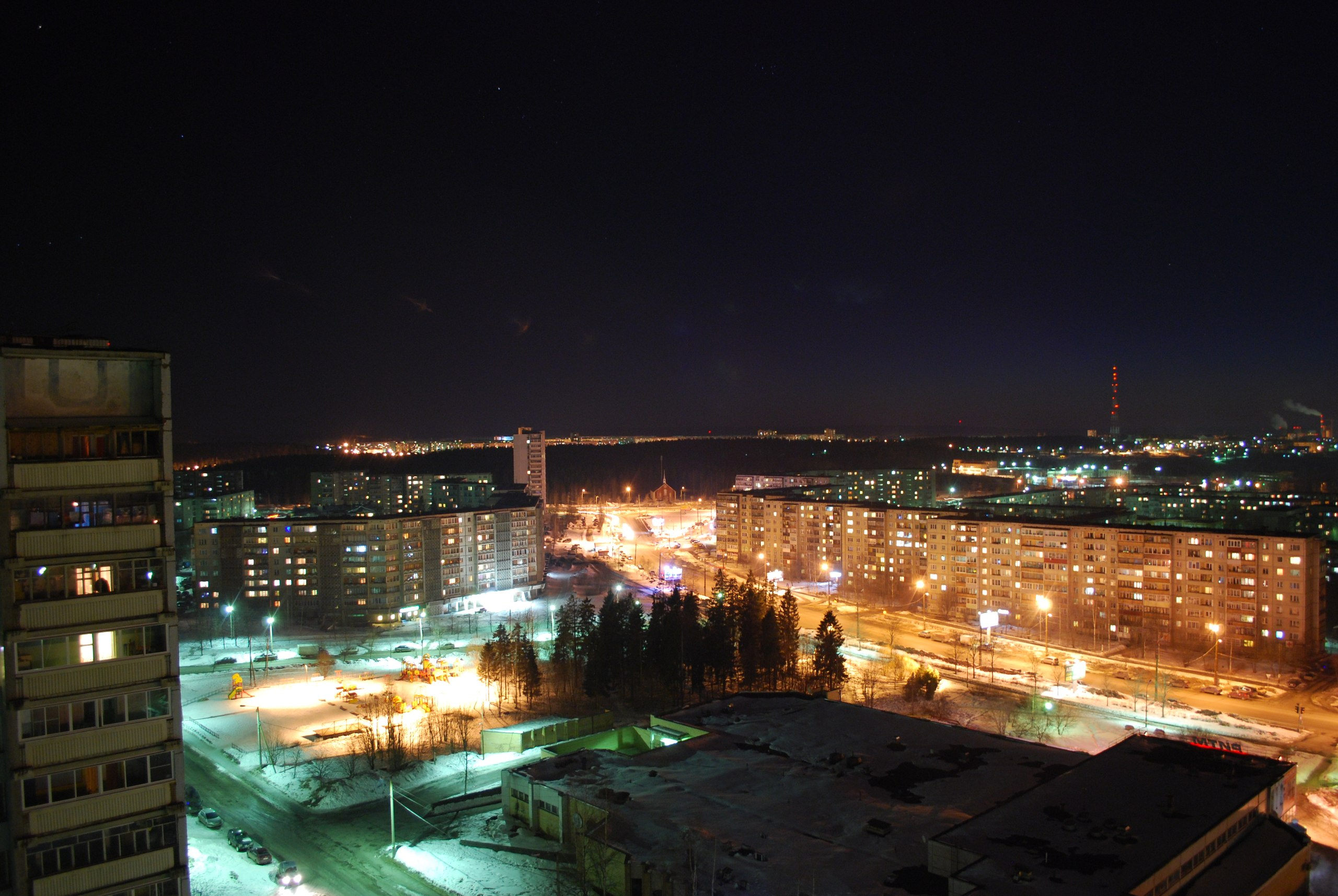 Район Петрозаводска-Кукковка. Вид с 16-го этажа